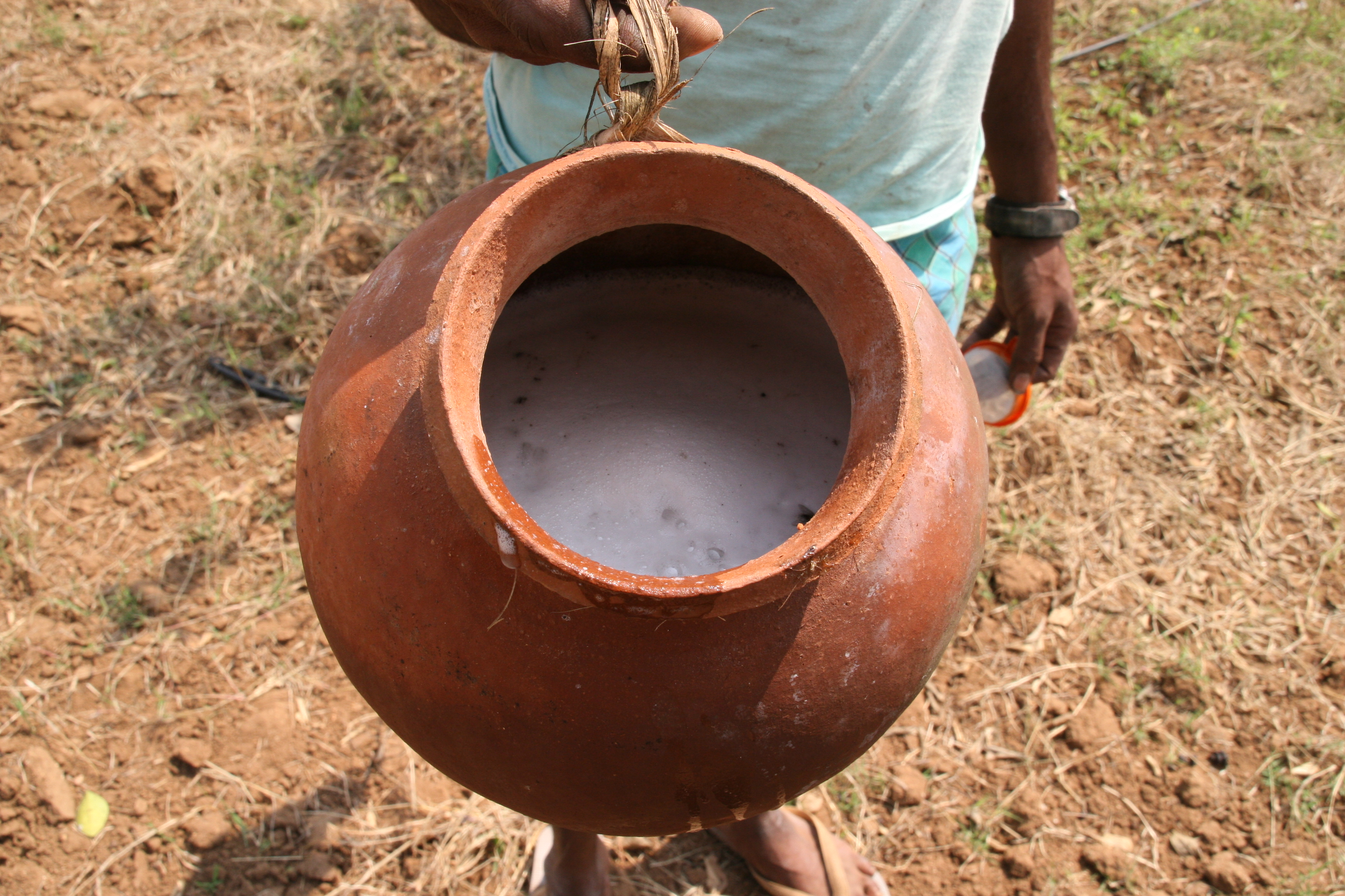 കള്ള് ചെത്തിയെടുത്ത ഉടനെ. ഫെർമന്റ് ചെയ്യുപോഴുണ്ടാകുന്ന നുര കാണാം.